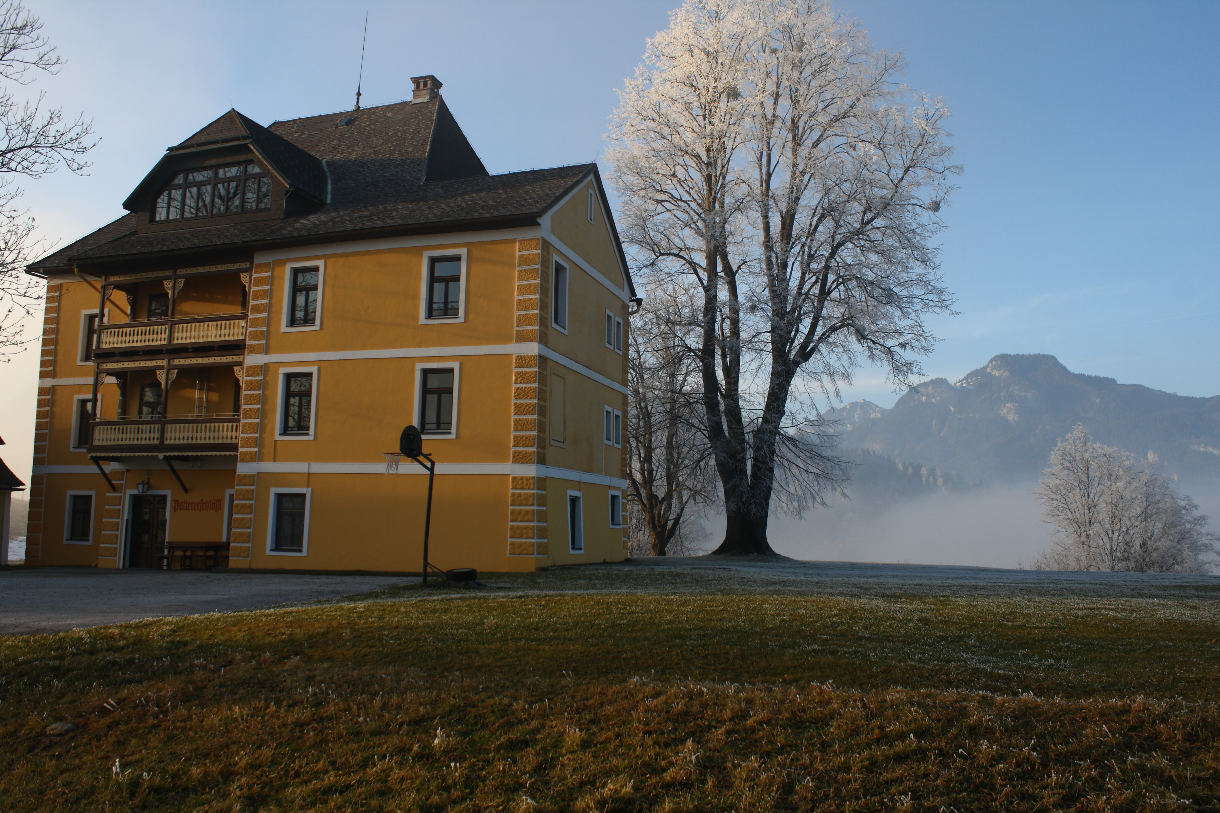 Puttererschlössl, Aigen im Ennstal, Steiermark, Austria